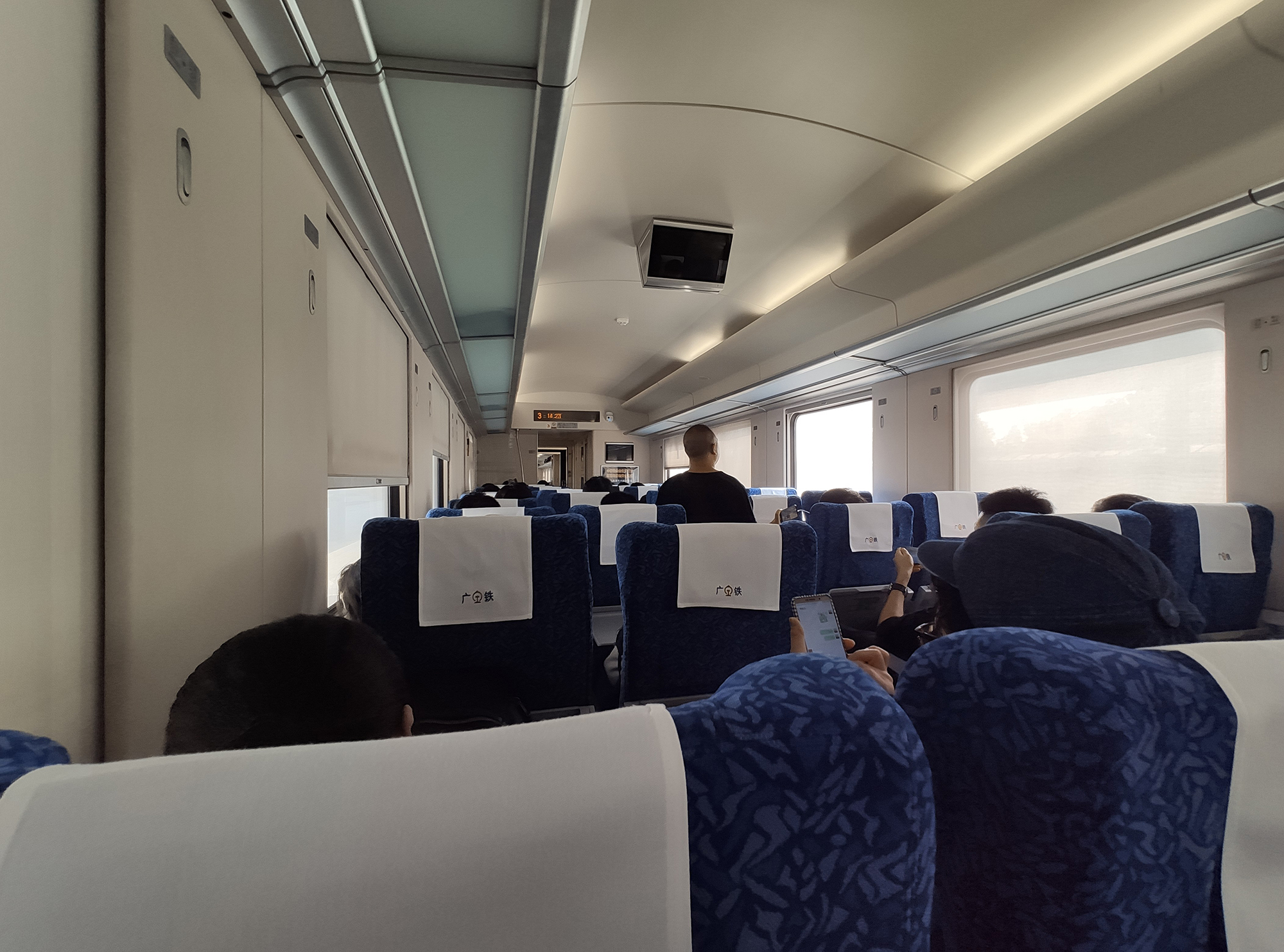 中文（中国大陆）: 广河深城际列车 广九版RZ25T软座车厢